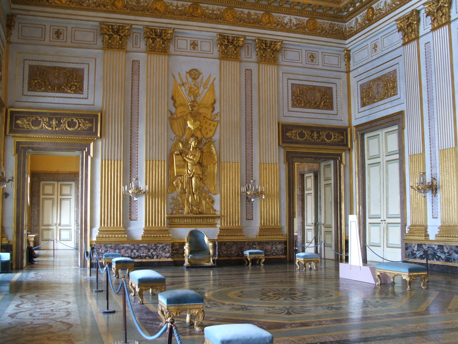 Caserta, Reggia di Caserta. Appartamento nuovo del Re. Sala del Trono. È la più grande degli Appartamenti reali. Rimasta senza decorazioni per circa mezzo secolo, fu restaurata per conto di Francesco I dall'architetto Pietro Bianchi. I lavori, iniziati nel 1827, furono interrotti e ripresi più volte e completati solo nel 1845, ad opera dell'architetto Gaetano Genovese.